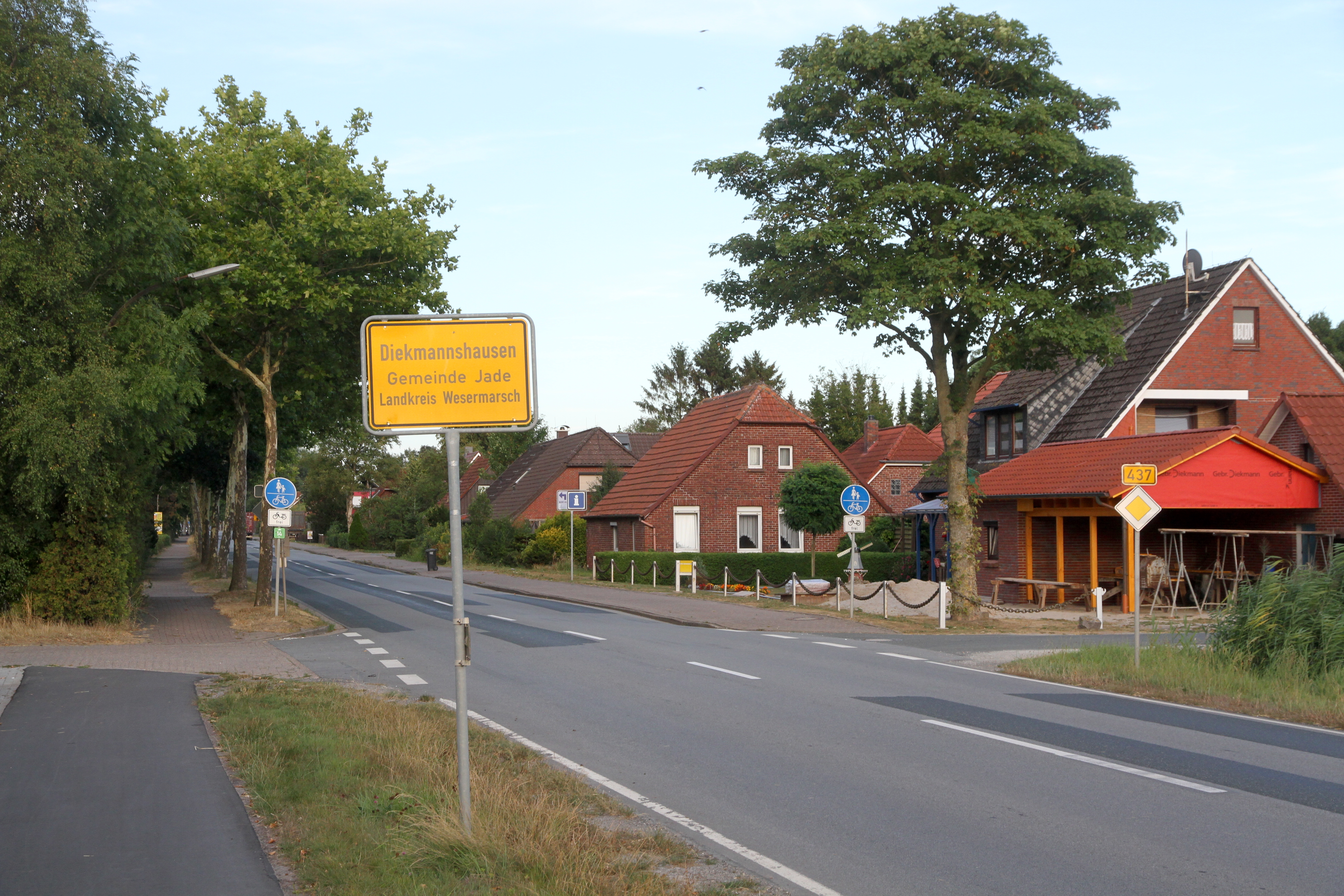 Zufahrt auf der B 437 aus Richtung Varel kommend